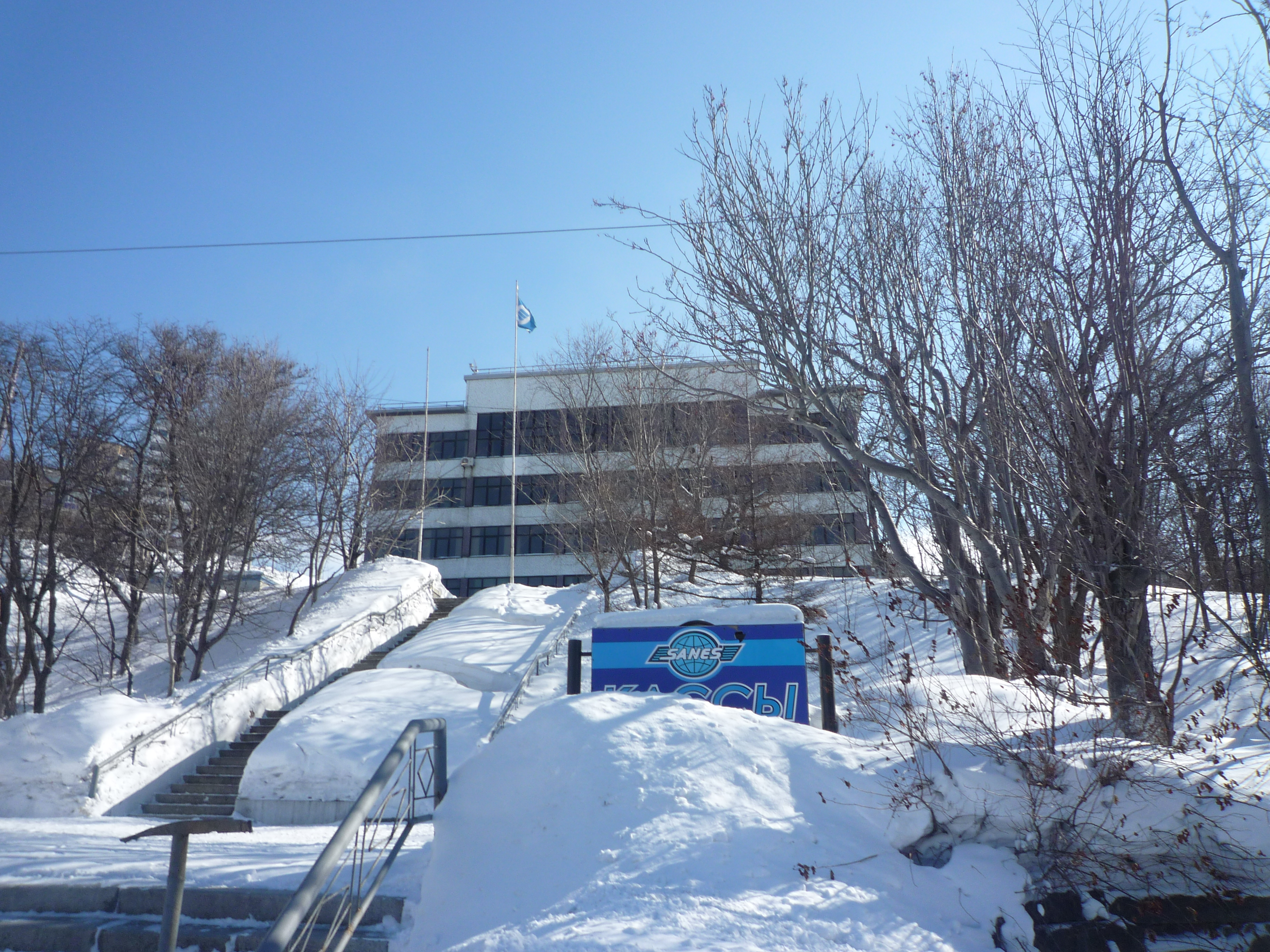 СахМП